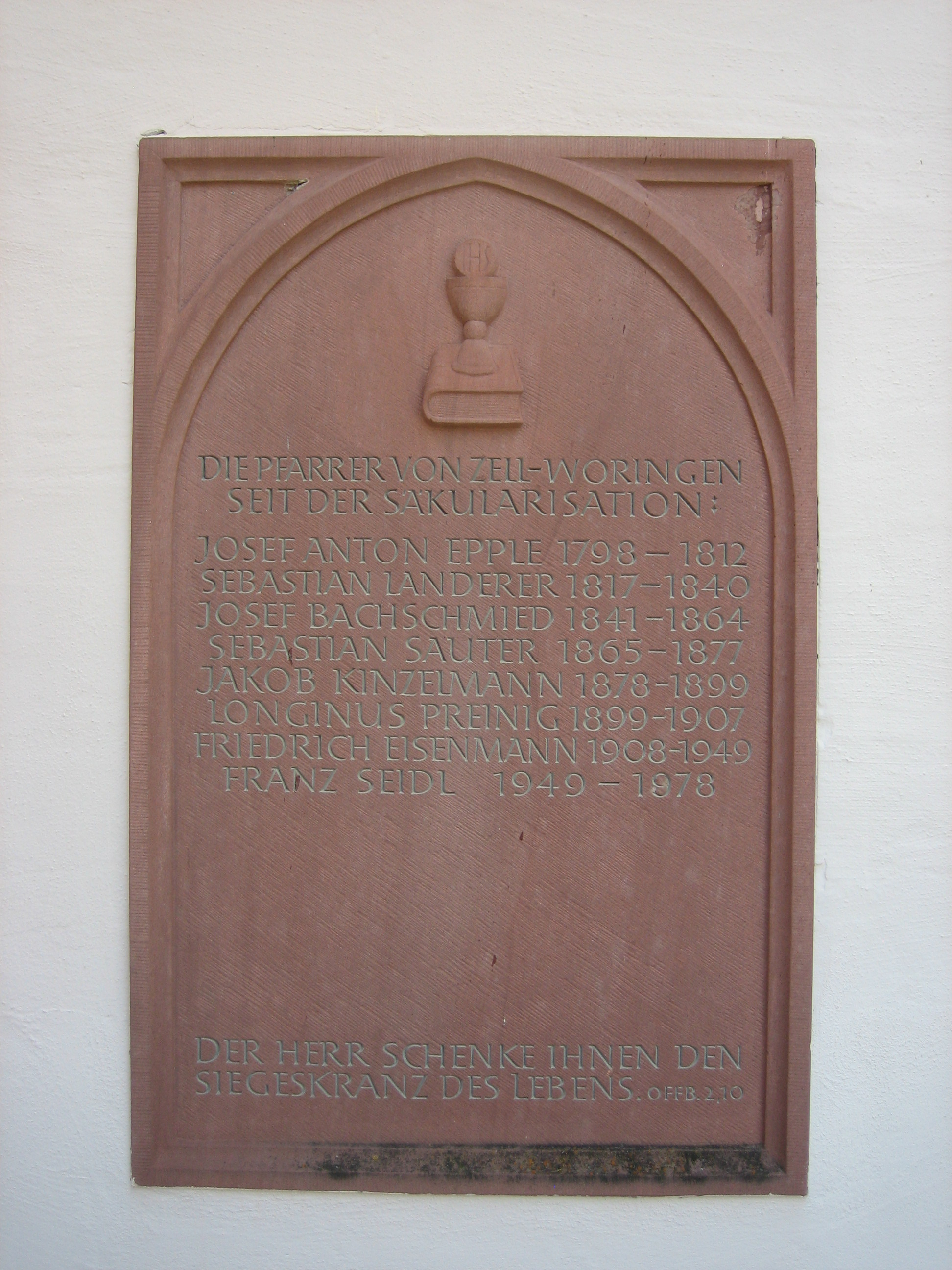 Gedenktafel der Pfarrer von Zell, seit 1803